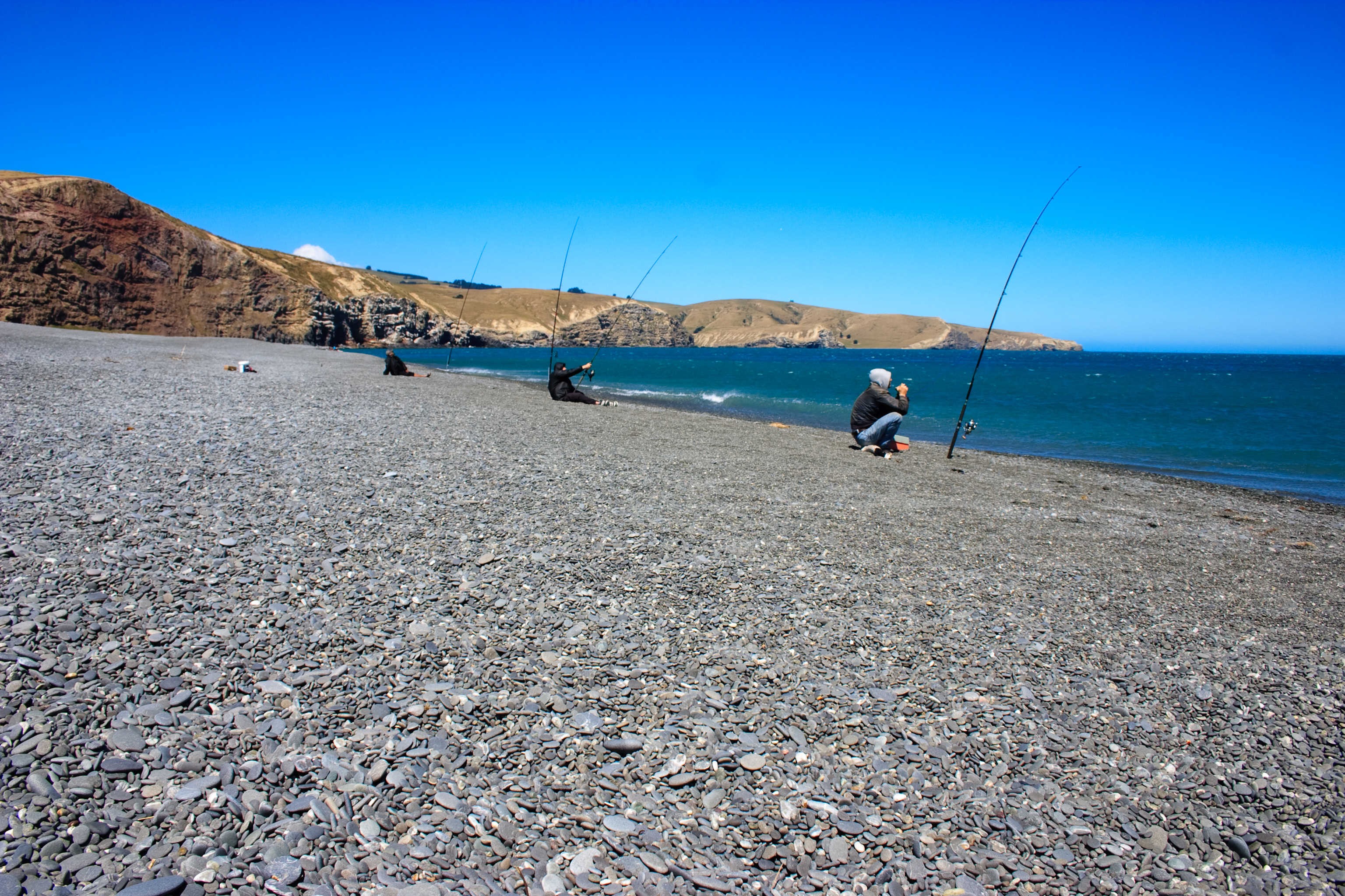 Fishing at Birdling's Flat.